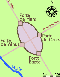 Carte de Reims sous le Bas-Empire romain.